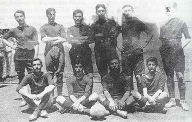 Η πρώτη ομάδα του Παναθηναϊκού το 1908 υπό την ονομασία Ποδοσφαιρκός Όμιλος Αθήνα